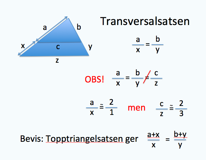 Transversalsatsen och bevis.